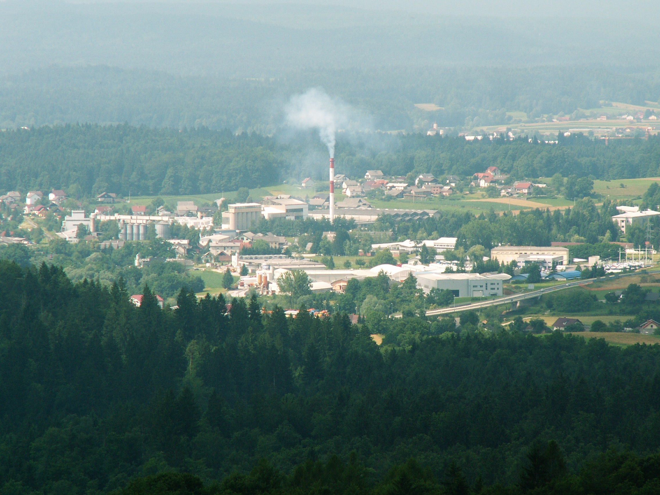 Del Novega mesta - Bršljin slikan s Trške gore. Lastno delo